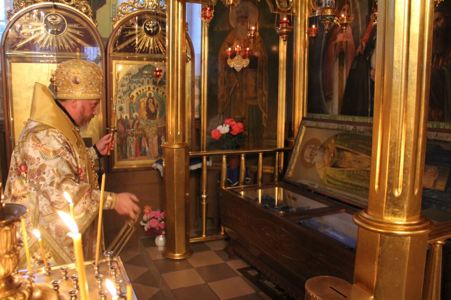 22 сентября 2012 года. Всенощное бдение в Свято-Покровском храме Свято-Иоанно-Кормянского женского монастыря в г.п. Корма Добрушского района. Епископу Стефану сослужили архимандрит Варсонофий, игумен Авксентий с духовенством.